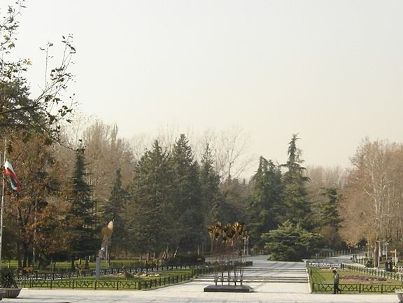 Mellat Park, Tehran